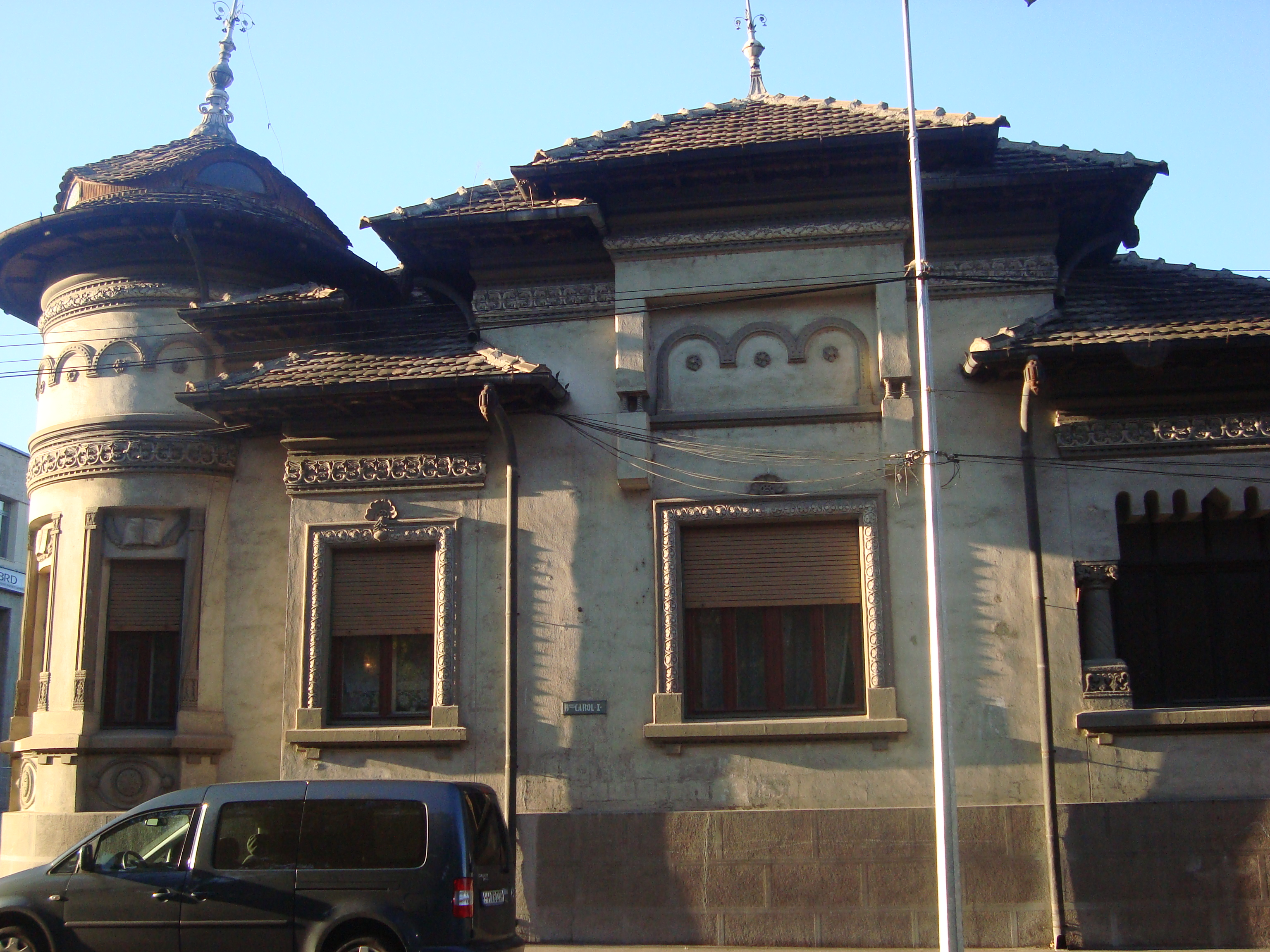 Casa istorica